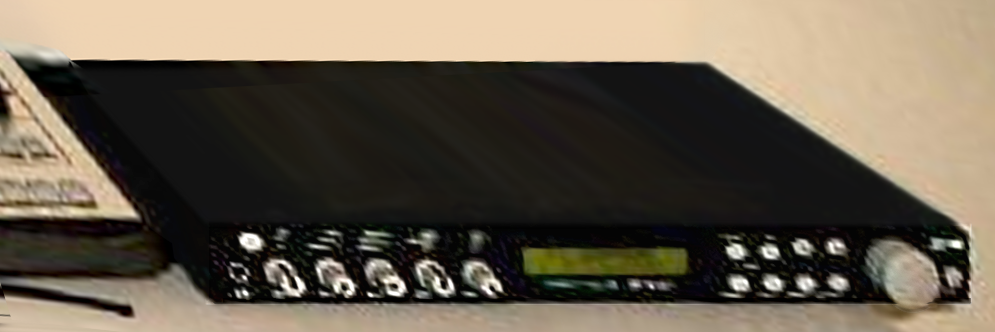 E-mu Proteus 2000 (1998)